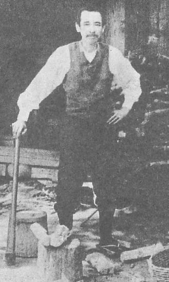 A politician from Japan,田尻稲次郎（Inajiro Tajiri）